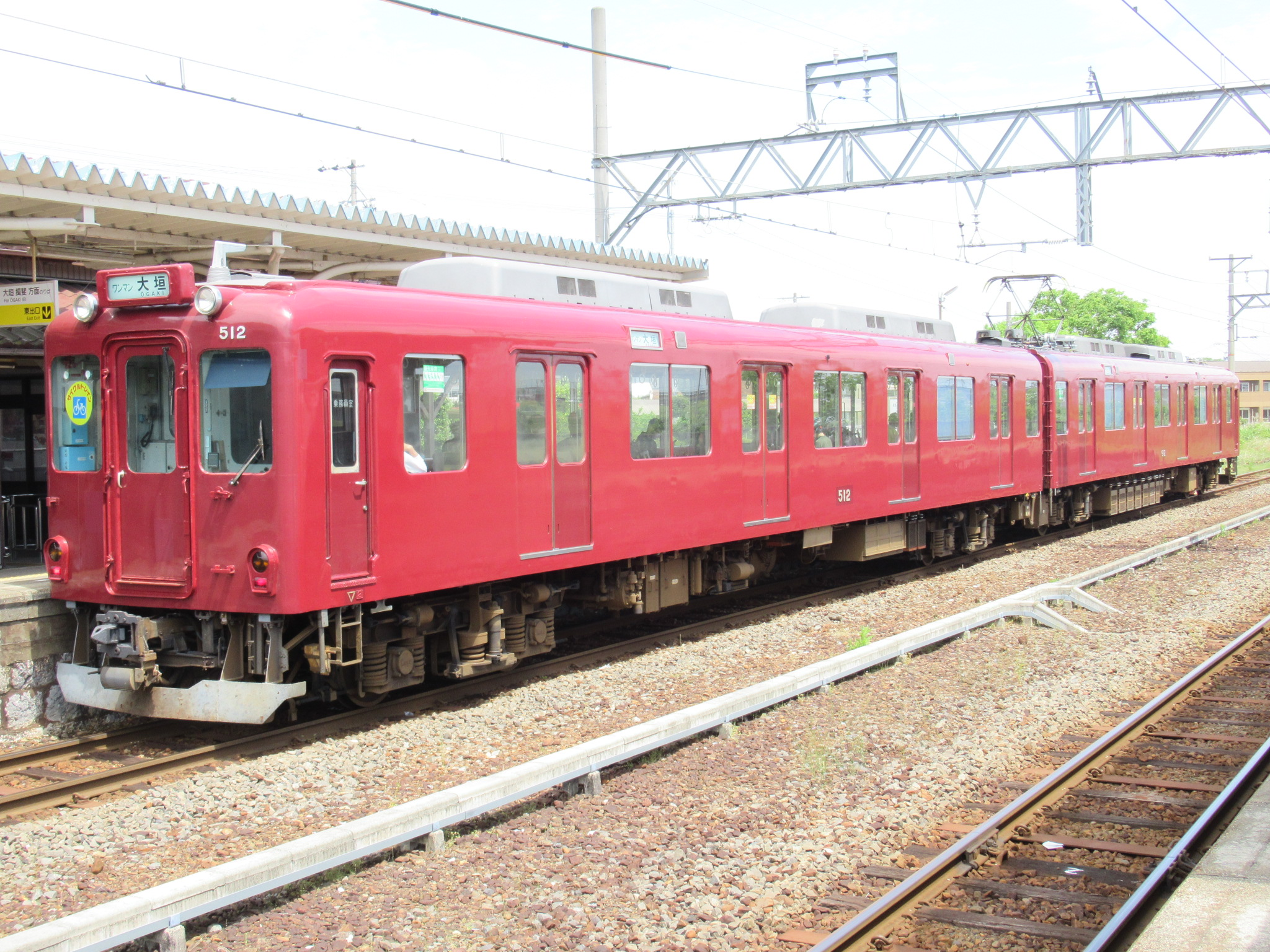 養老鉄道512 美濃高田駅